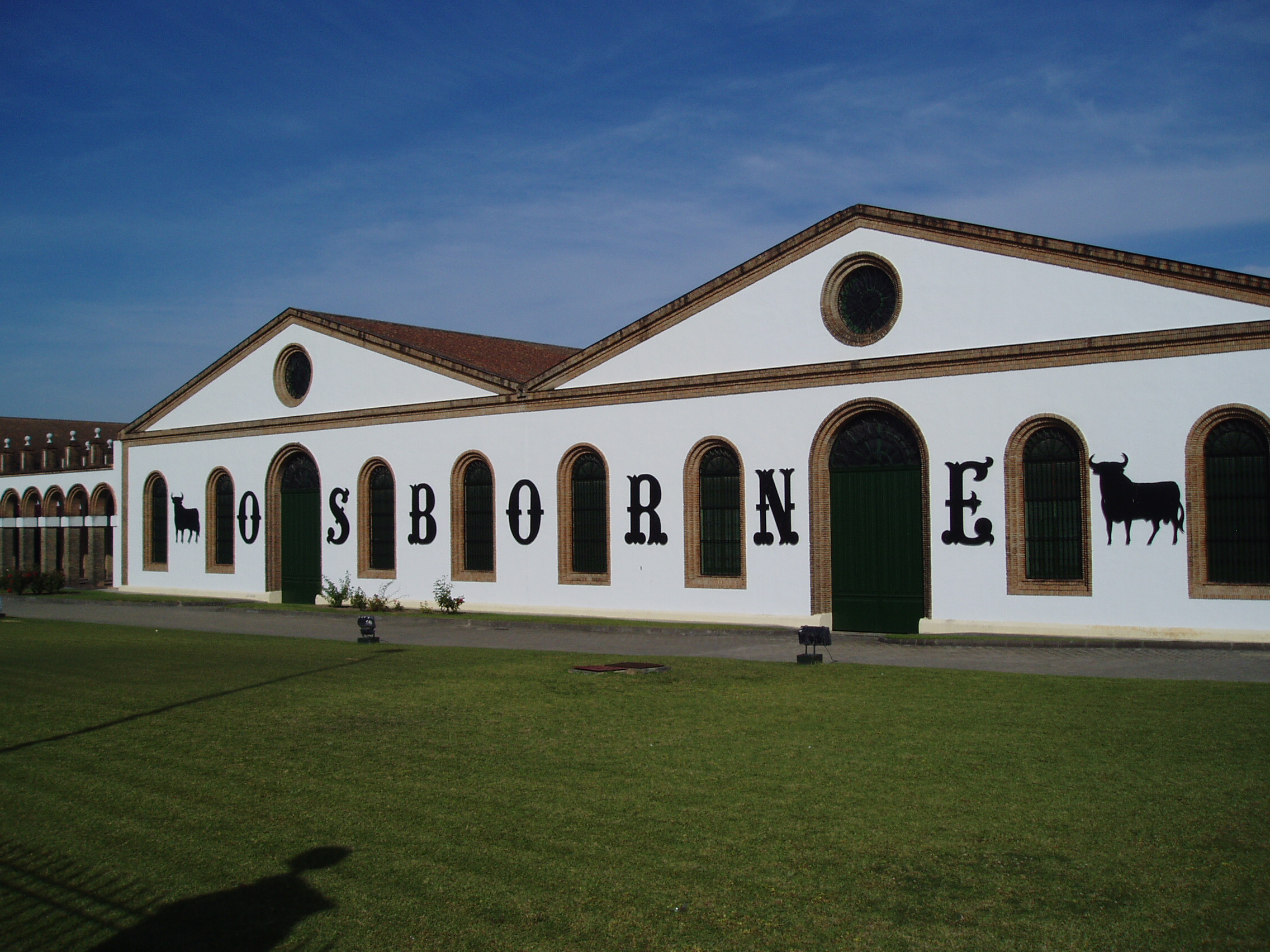 Bodegas El Tiro, del Grupo Osborne, en El Puerto de Santa María.